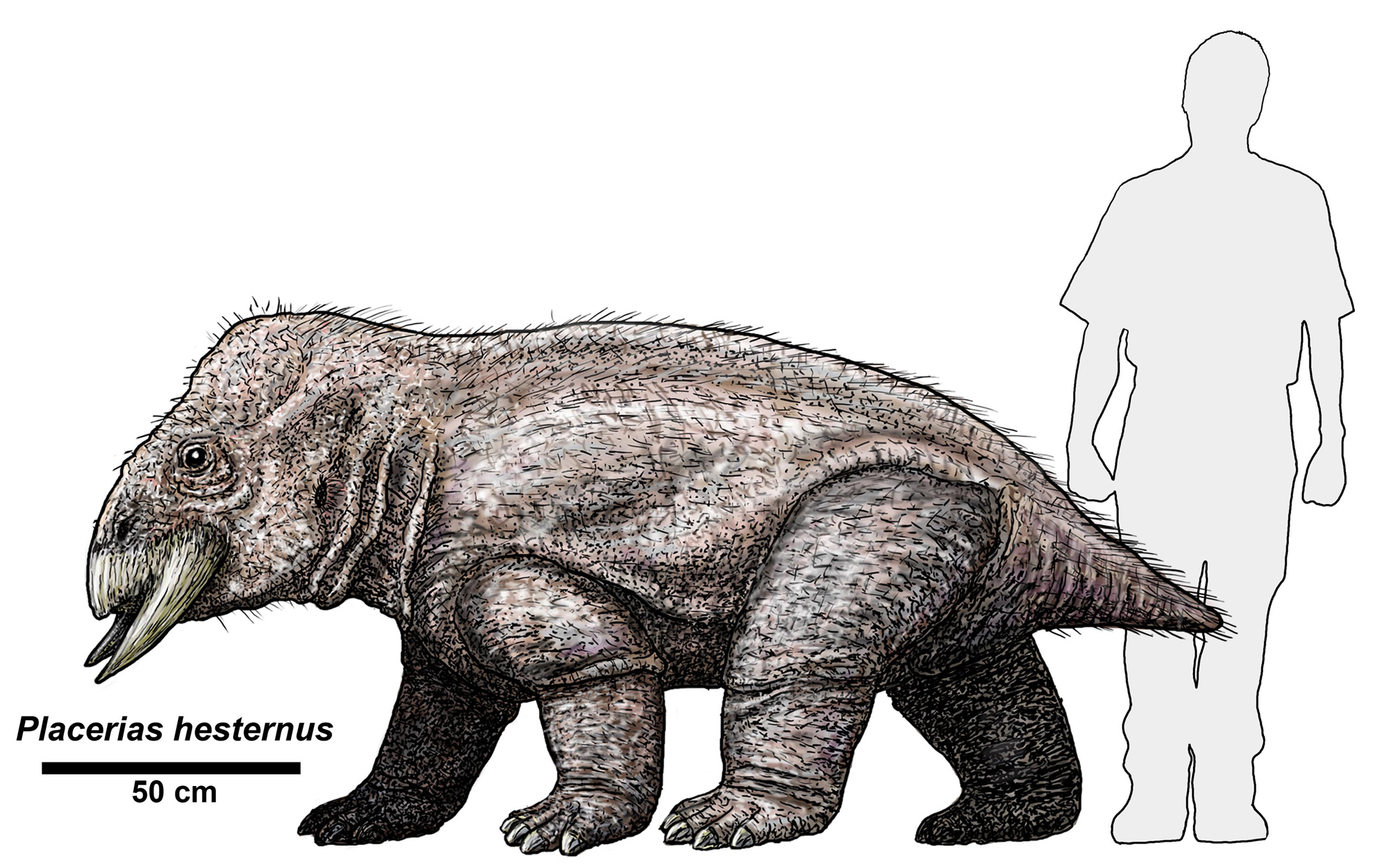 Credit Dr. Jeff Martz/NPS